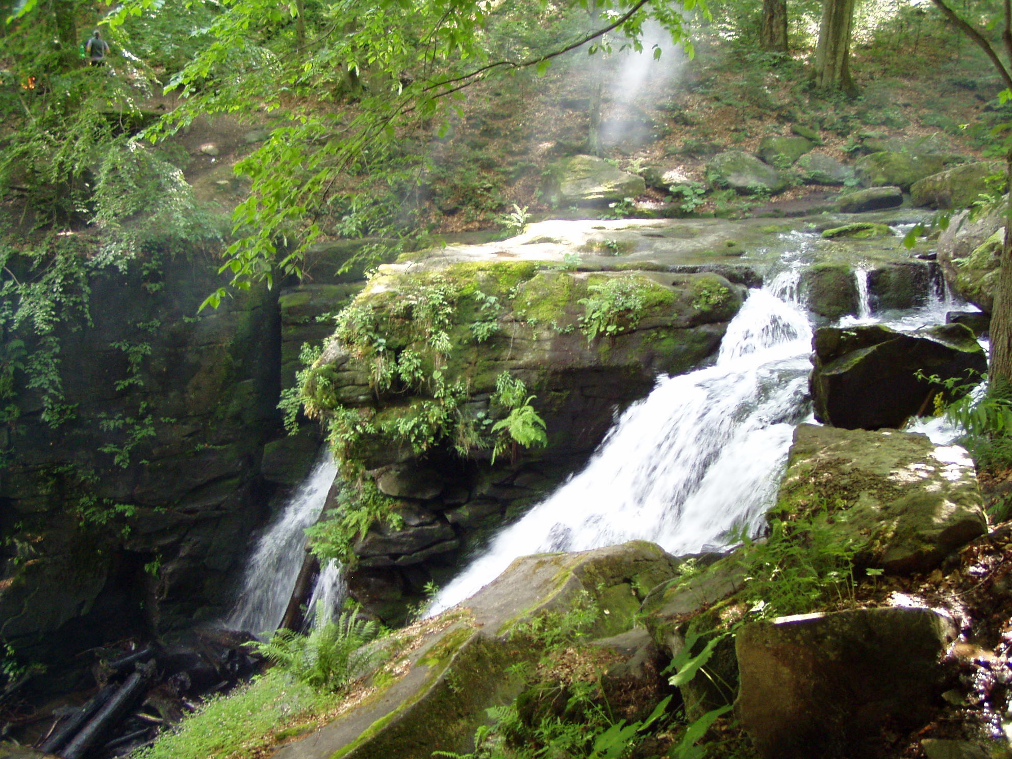 Vodopád Vojvodin